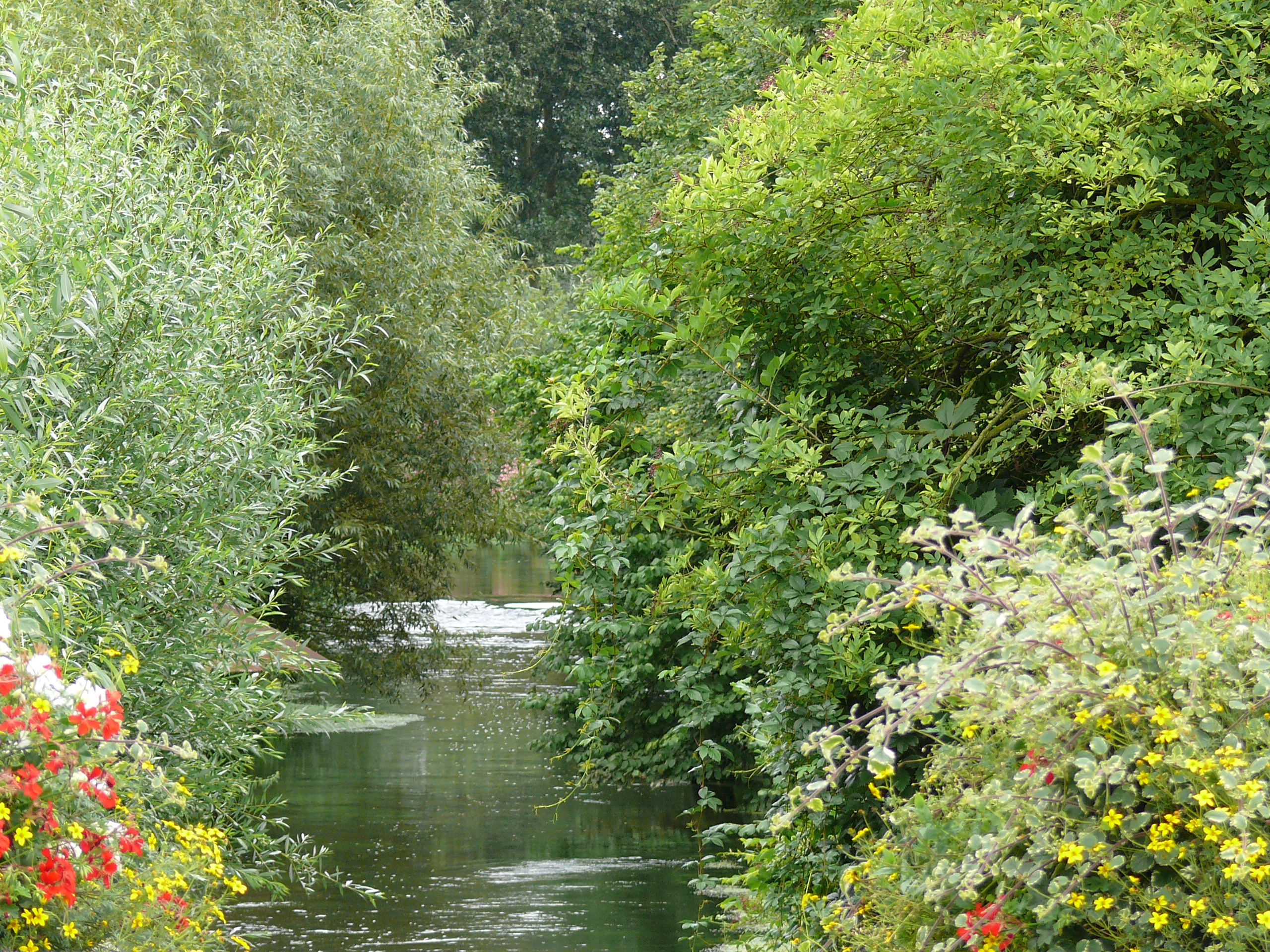 L'Avre (affluent de la Somme) à Moreuil (Somme, Picardie, France) - Photo prise du pont de la RD 920 vers l'aval